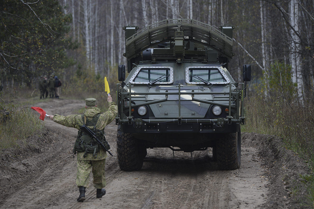 Командно-штабное учение с новосибирским соединением Ракетных войск стратегического назначения.